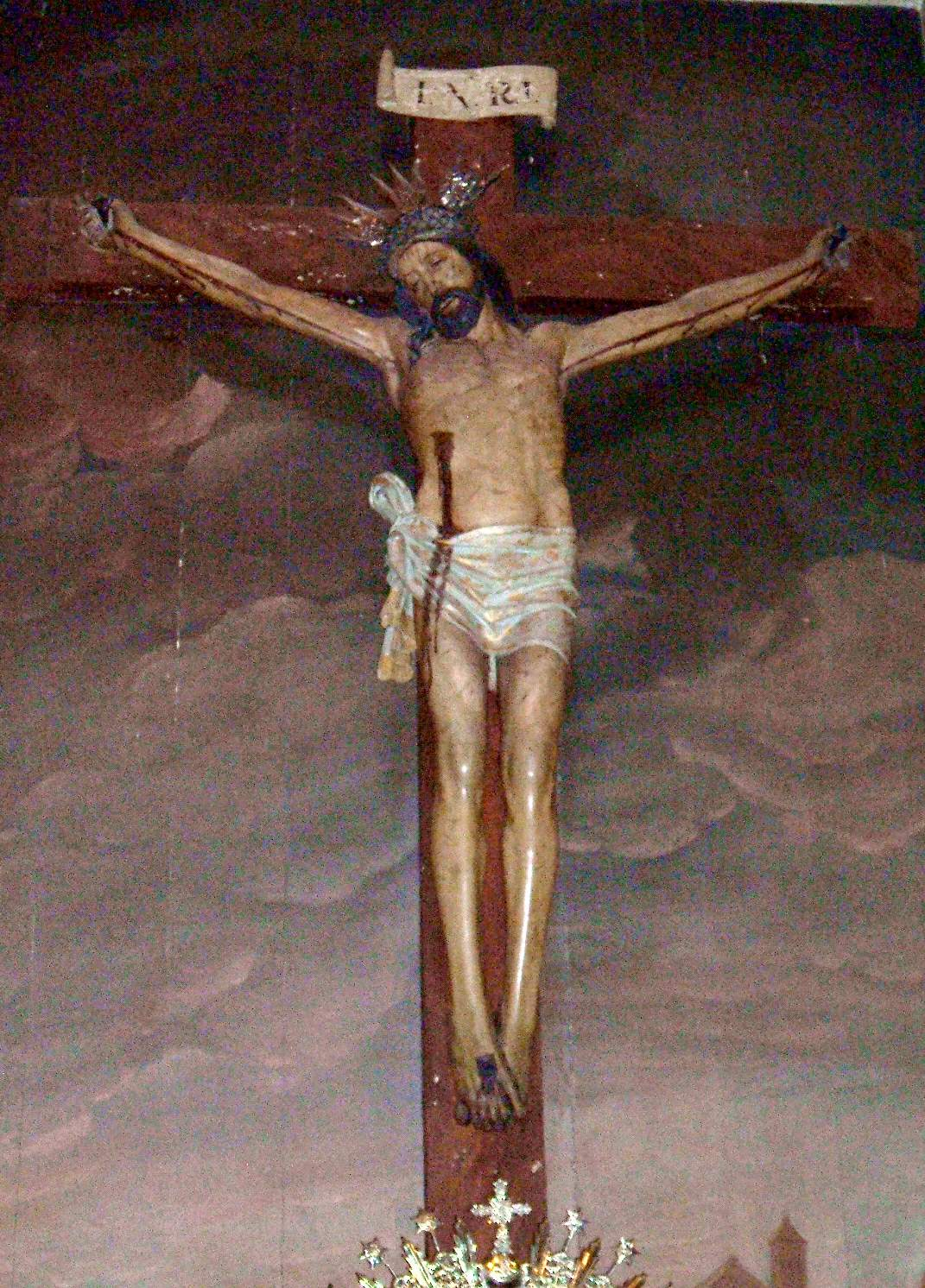 Capilla del Santisimo Cristo del Refugio, en la Catedral de Jaén